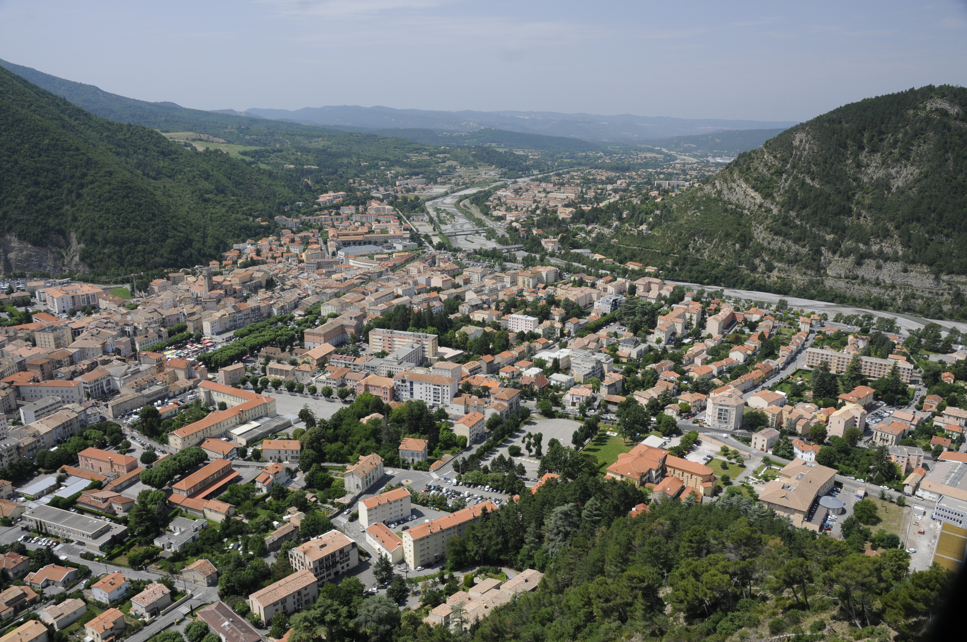 Vue aérienne de la ville de Digne-les-Bains préfecture des Alpes de Haute-Provence